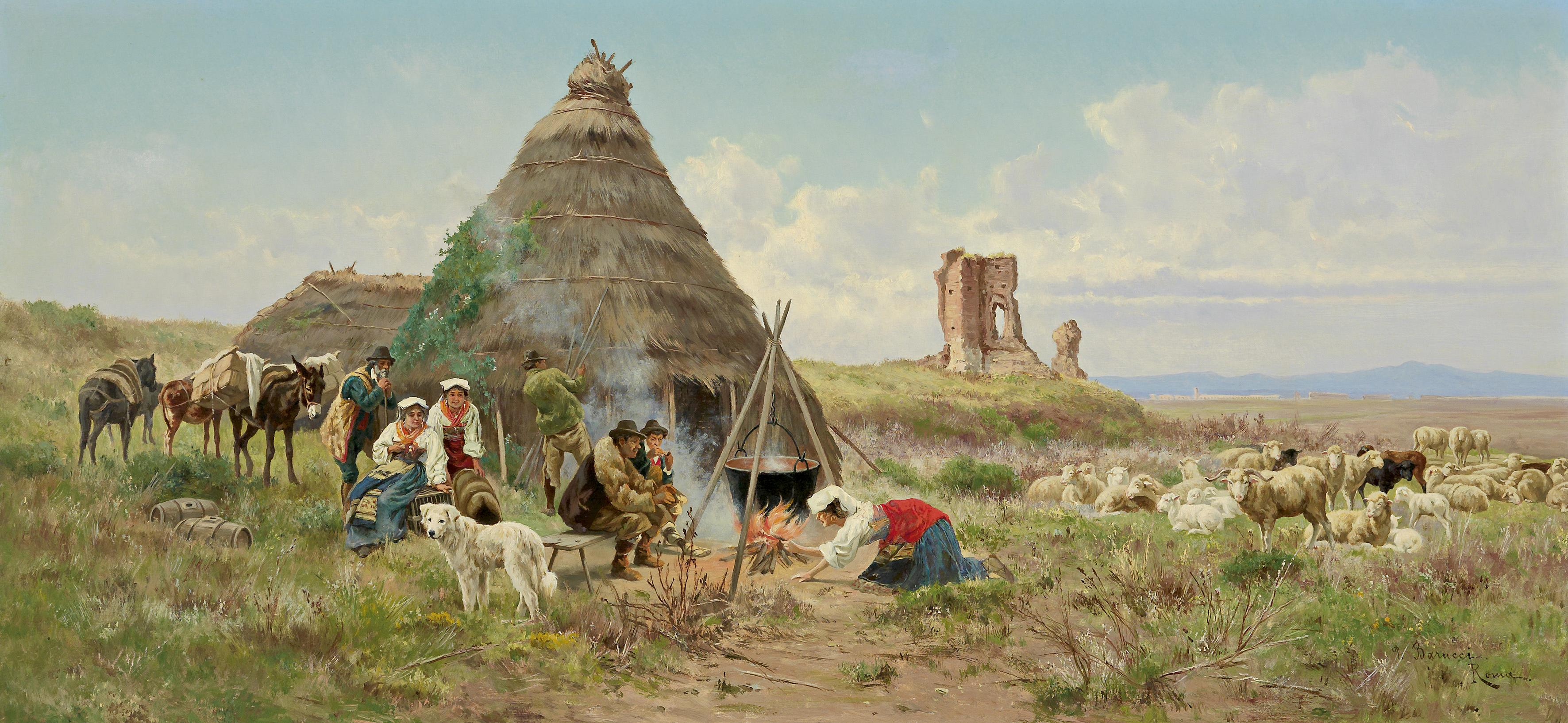 Rastende Hirten in der römischen Campagna